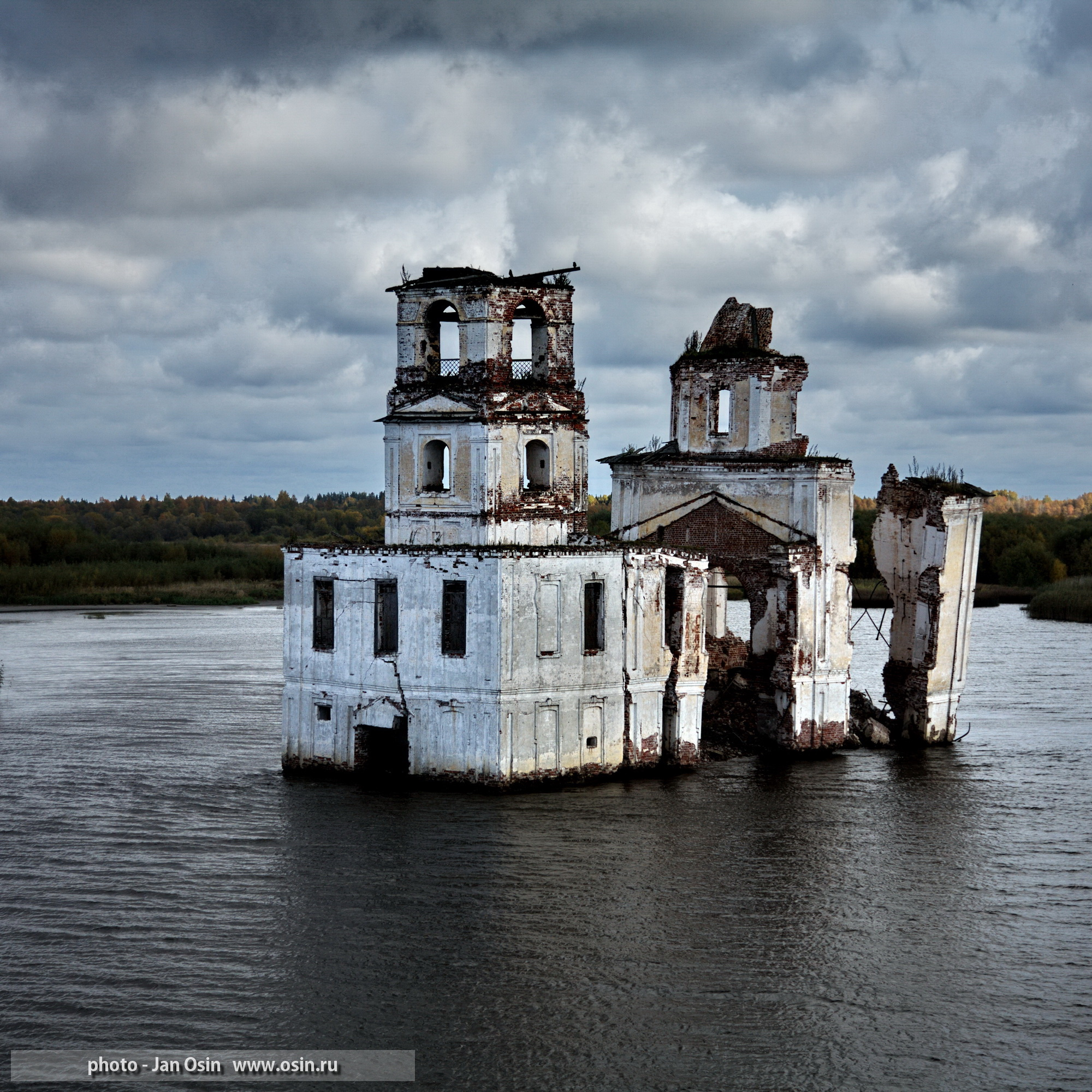 Затопленная Церковь Рождества Христова в Крохино. Фоторабота Яна Осина.